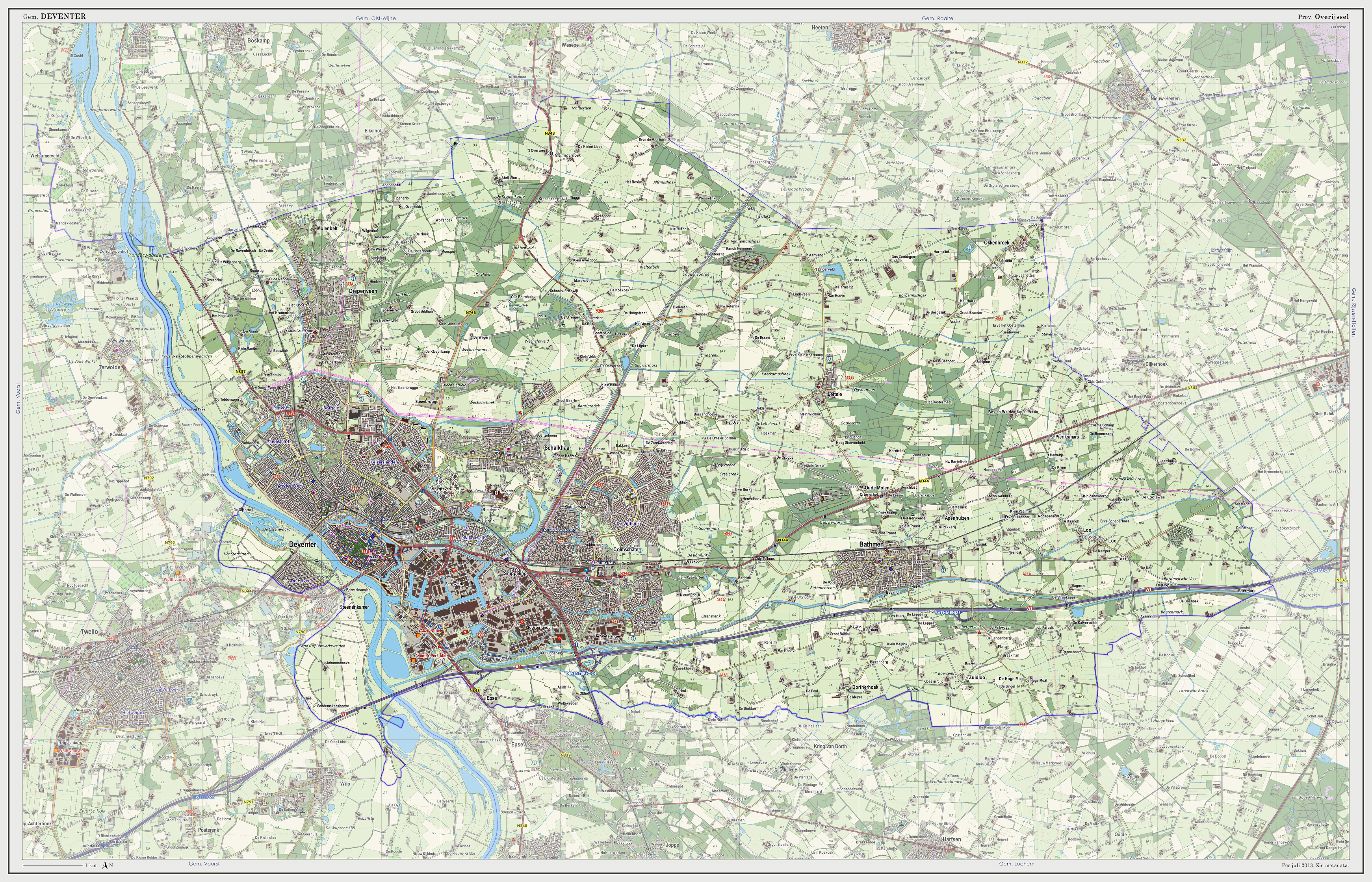 Topografische kaart van gemeente Deventer (2013). Samengesteld door Jan-Willem van Aalst op basis van de GML open geodata van de BRT/Top10NL (basisregistratie Topografie, Kadaster 2011), vrijgegeven door Kadaster onder de Creative Commons BY licentie. Additionele gegevens uit BAG (8 juli 2013), uit de Open Street Map (9 juli 2013) en uit de Risicokaart. Peildatum kaartbeeld: 9 juli 2013. Zie ook Gemeentenatlas.nl Samenstelling en kleurenschema: Jan-Willem van Aalst, met QuantumGIS en Photoshop. Zie ook de Legenda.